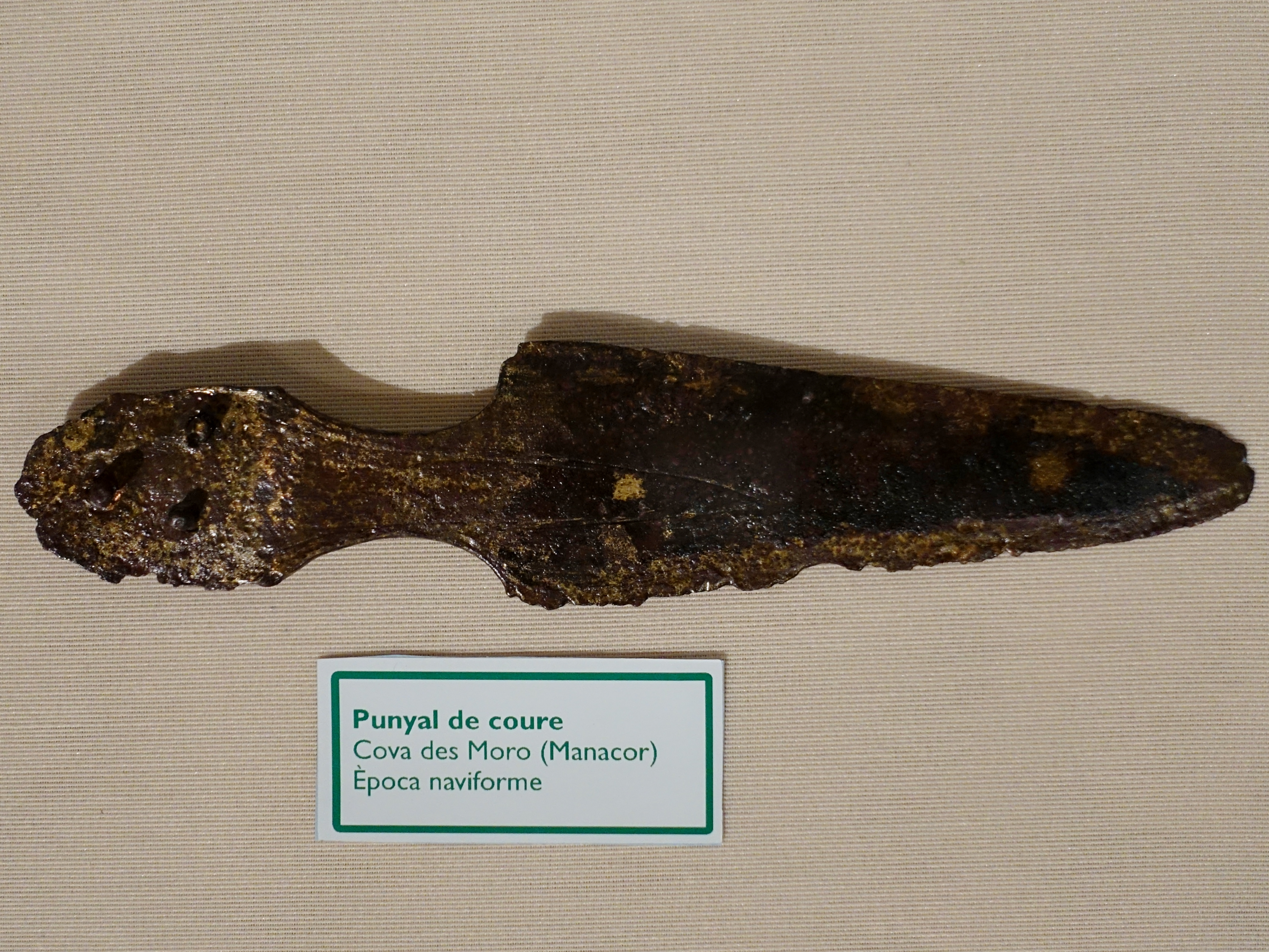 Kupferdolch im Historischen Museum von Manacor, Mallorca, Spanien